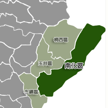 南化區相對位置